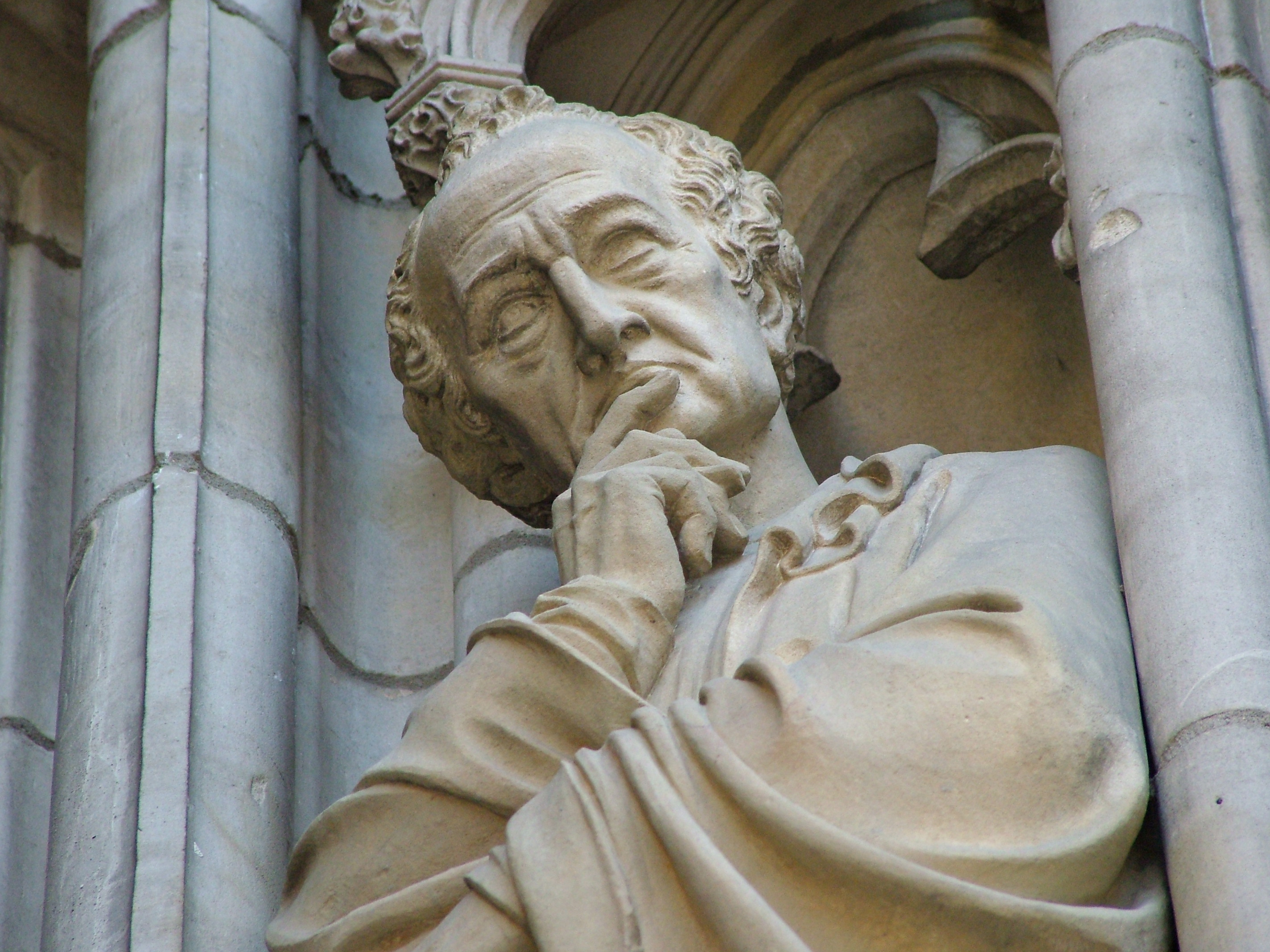 Goethe-Kopf, Lambertikirche Münster